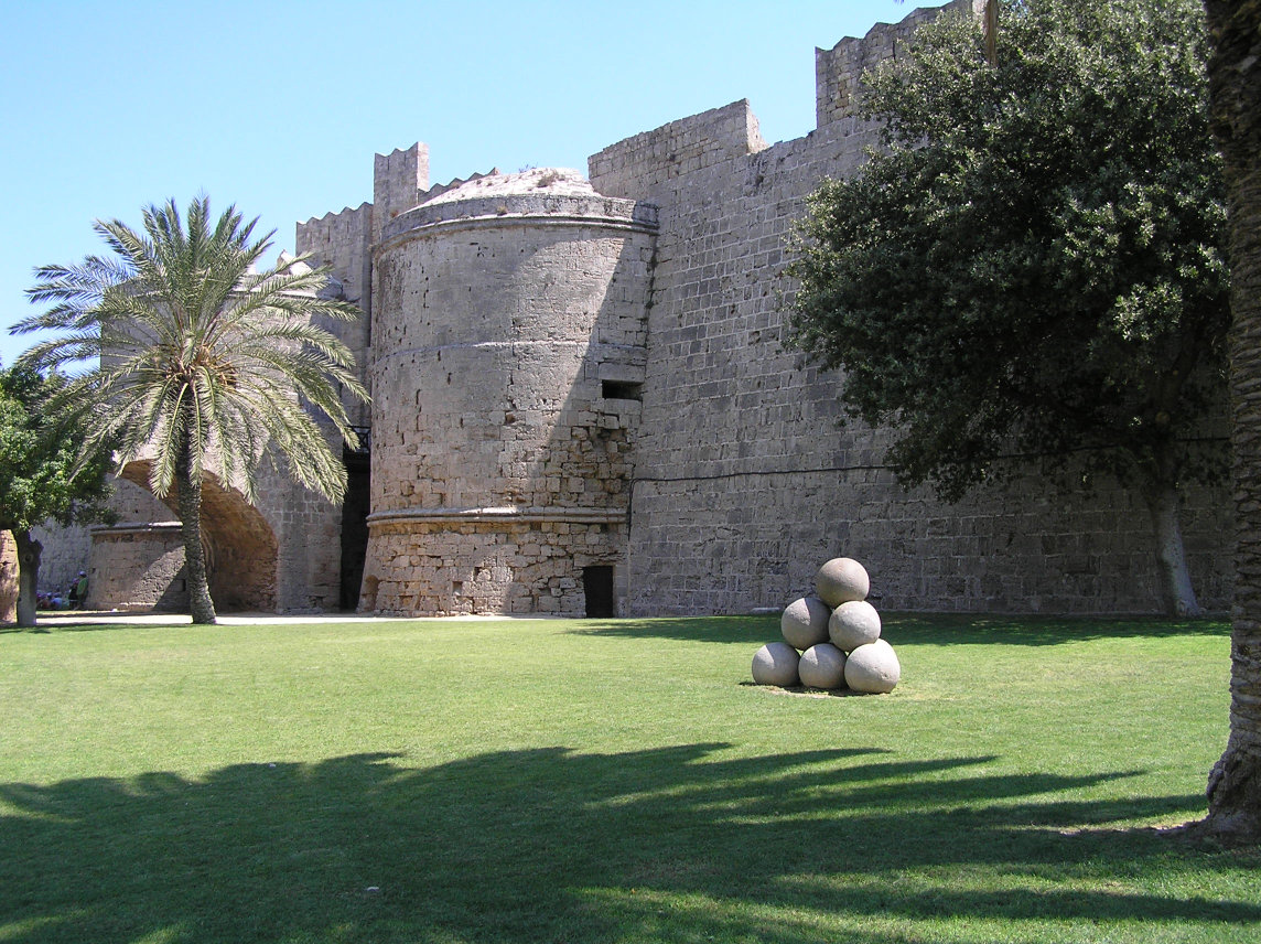 Zamek Wielkich Mistrzów w Rodos wraz z fragmentem fosy.